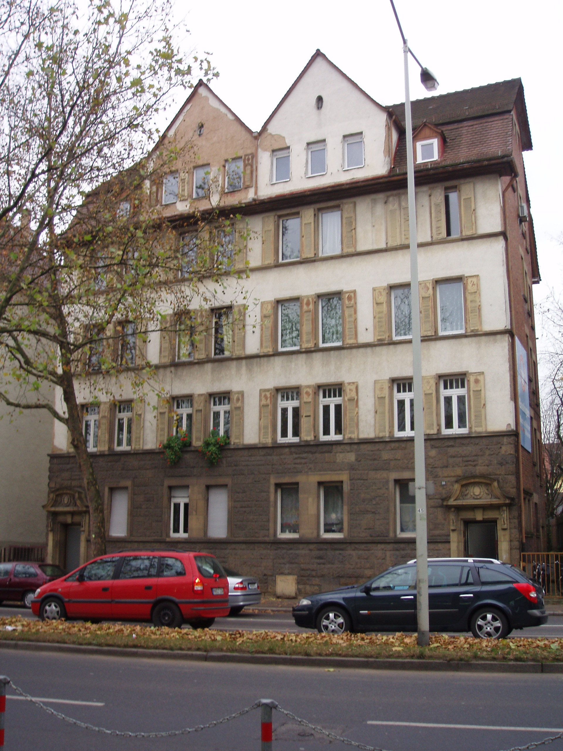 ein Gebäude von Beutinger und Steiner in der Heilbronner Südstraße